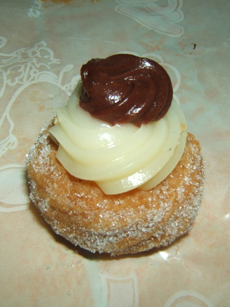 zeppola piccolissima, neanche mignon...